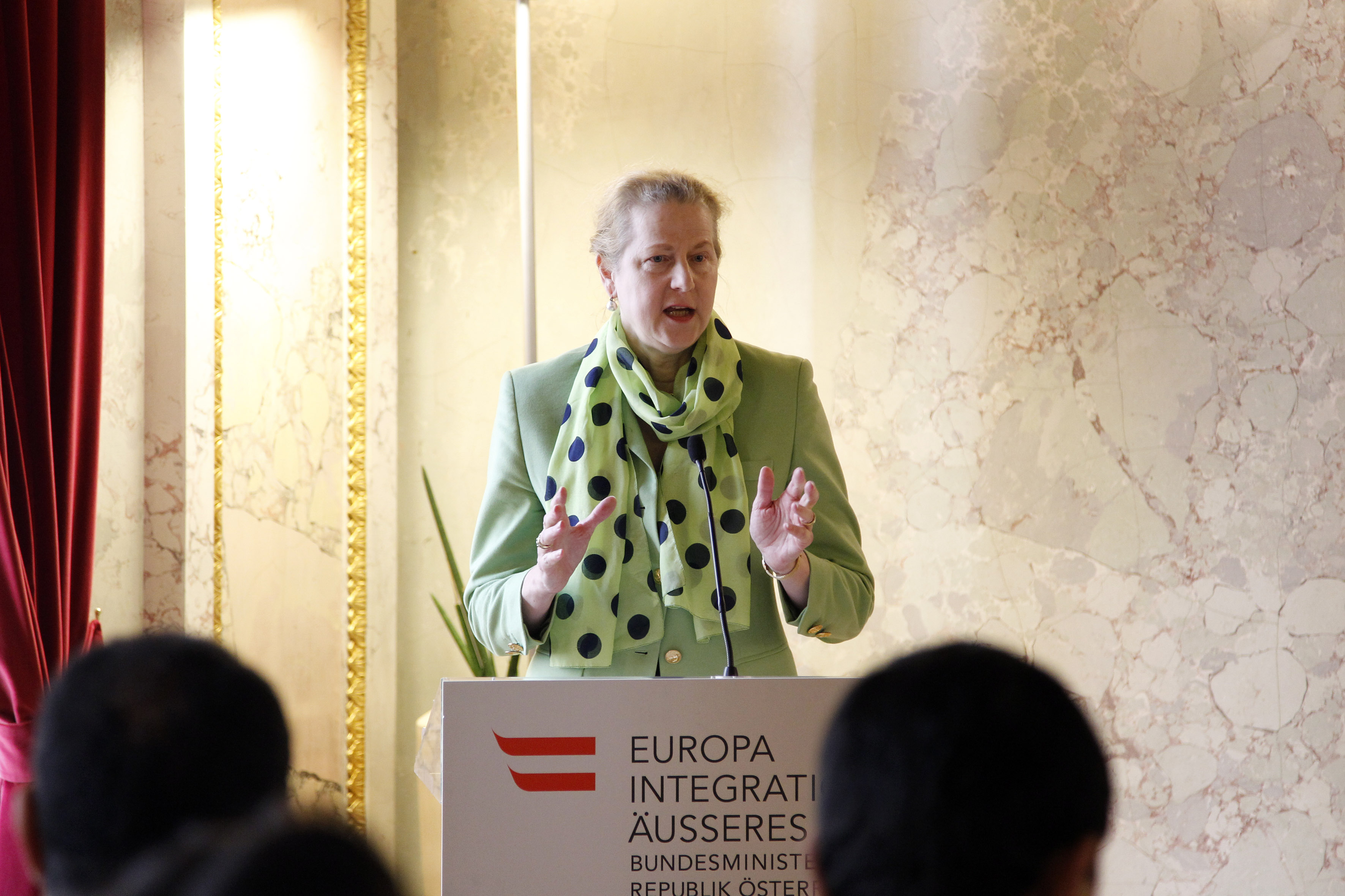 Die österreichische Diplomatin Christine Stix-Hackl spricht im 2. UN Briefing zu speziellen UN-Themen im Wiener Außenministerium.